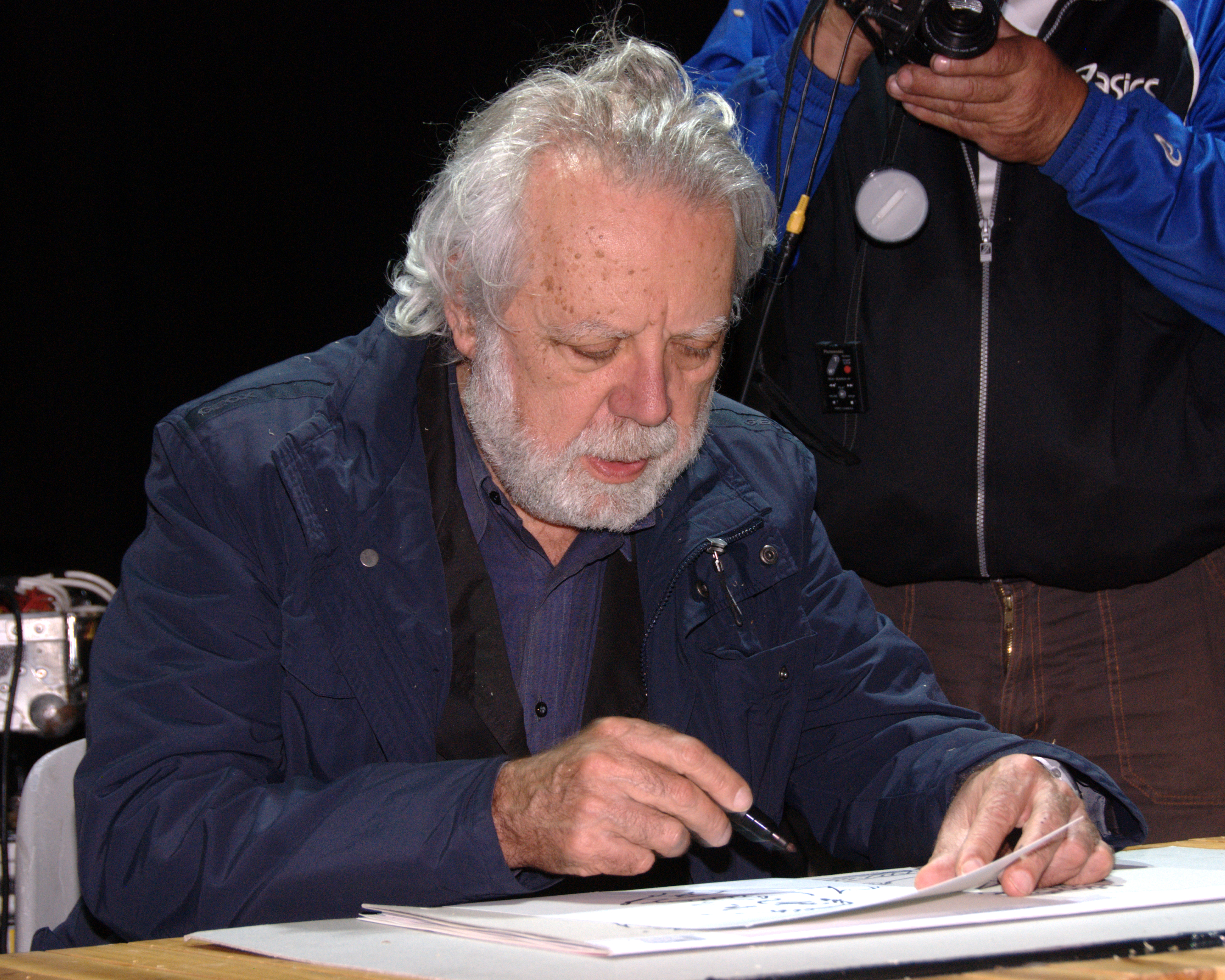 Sergio Staino sul palco con i Têtes de Bois durante la festa del 1° maggio a Trento.